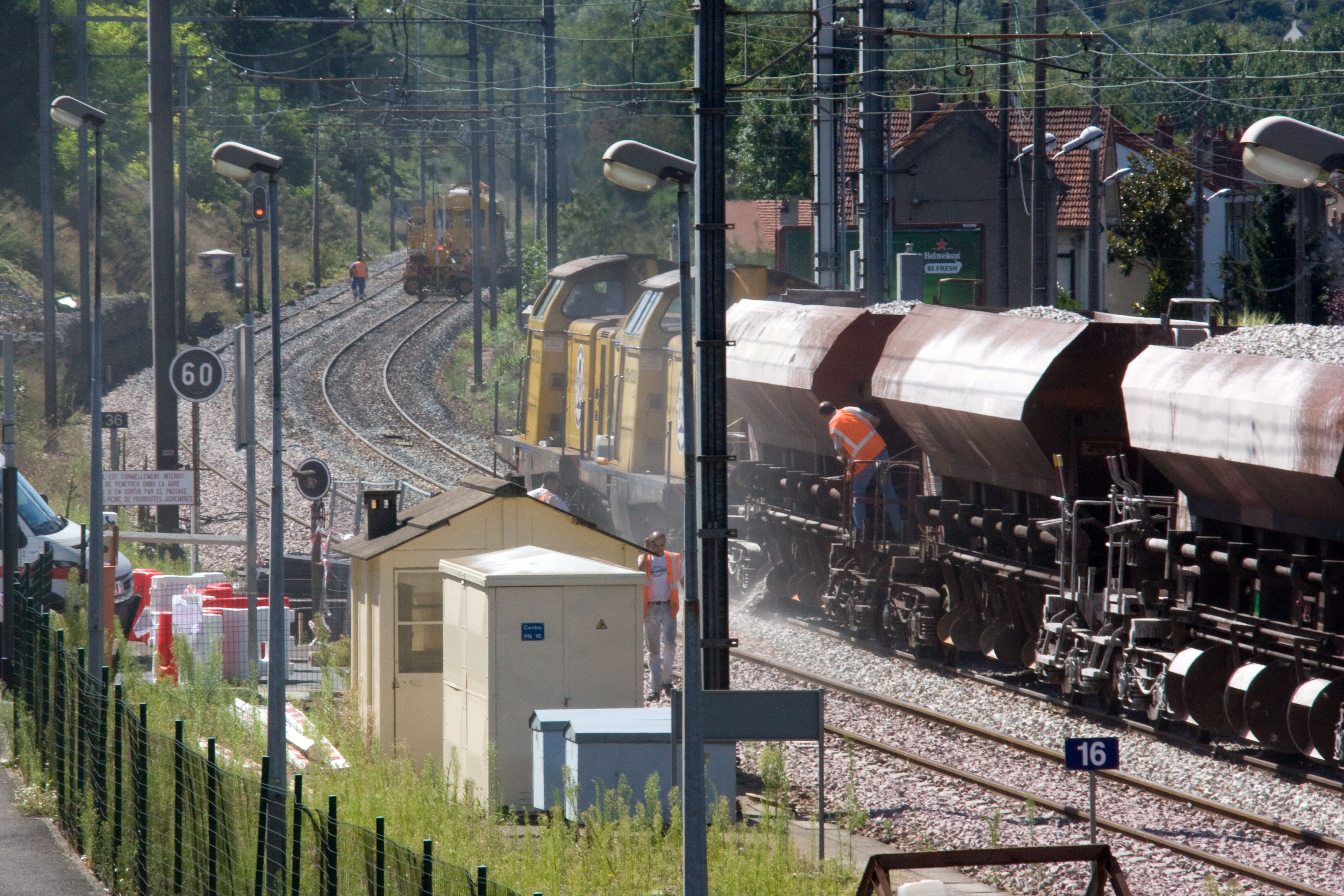 Un train de travaux en gare de Moulin-Galant (Essonne, France) le 20 aout 2010 lors d'une opération de Renouvellement Voie Ballast.